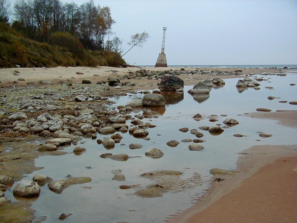 Ķurmrags Vidzemes jūrmalā 2000-10-21